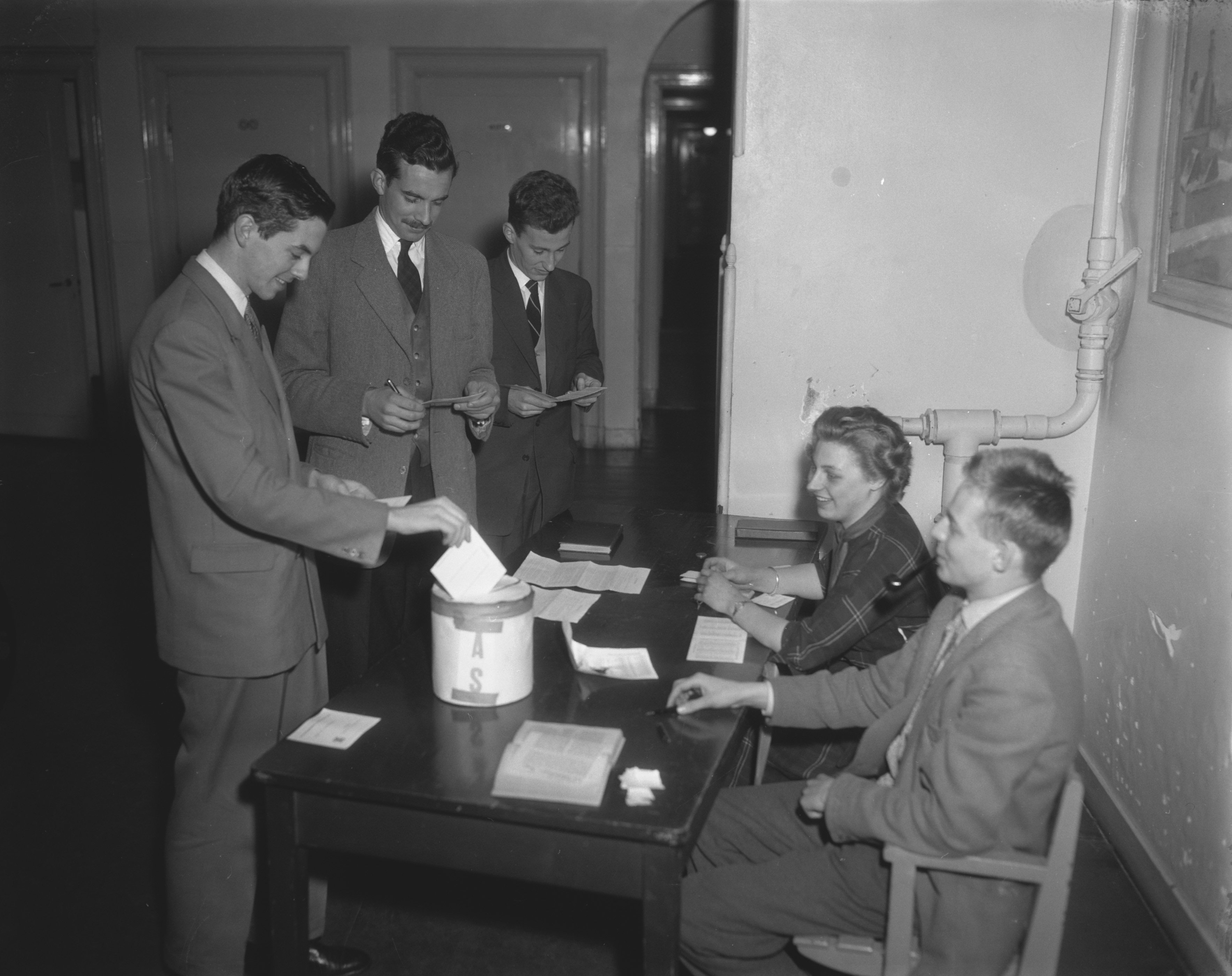 Collectie / Archief : Fotocollectie Anefo Reportage / Serie : [ onbekend ] Beschrijving : Van links naar rechts: Frits Bolkestein, E.C.M. Jurgens en J.R.J. van Asperen de Boer Datum : 11 februari 1958 Locatie : Amsterdam, Noord-Holland Persoonsnaam : Asperen-de Boer, J.R.J. van, Bolkestein, Frits, Jurgens, E.C.M. Instellingsnaam : ASVA Fotograaf : Pot, Harry / Anefo Auteursrechthebbende : Nationaal Archief Materiaalsoort : Negatief (zwart/wit) Nummer archiefinventaris : bekijk toegang 2.24.01.04 Bestanddeelnummer : 909-3259